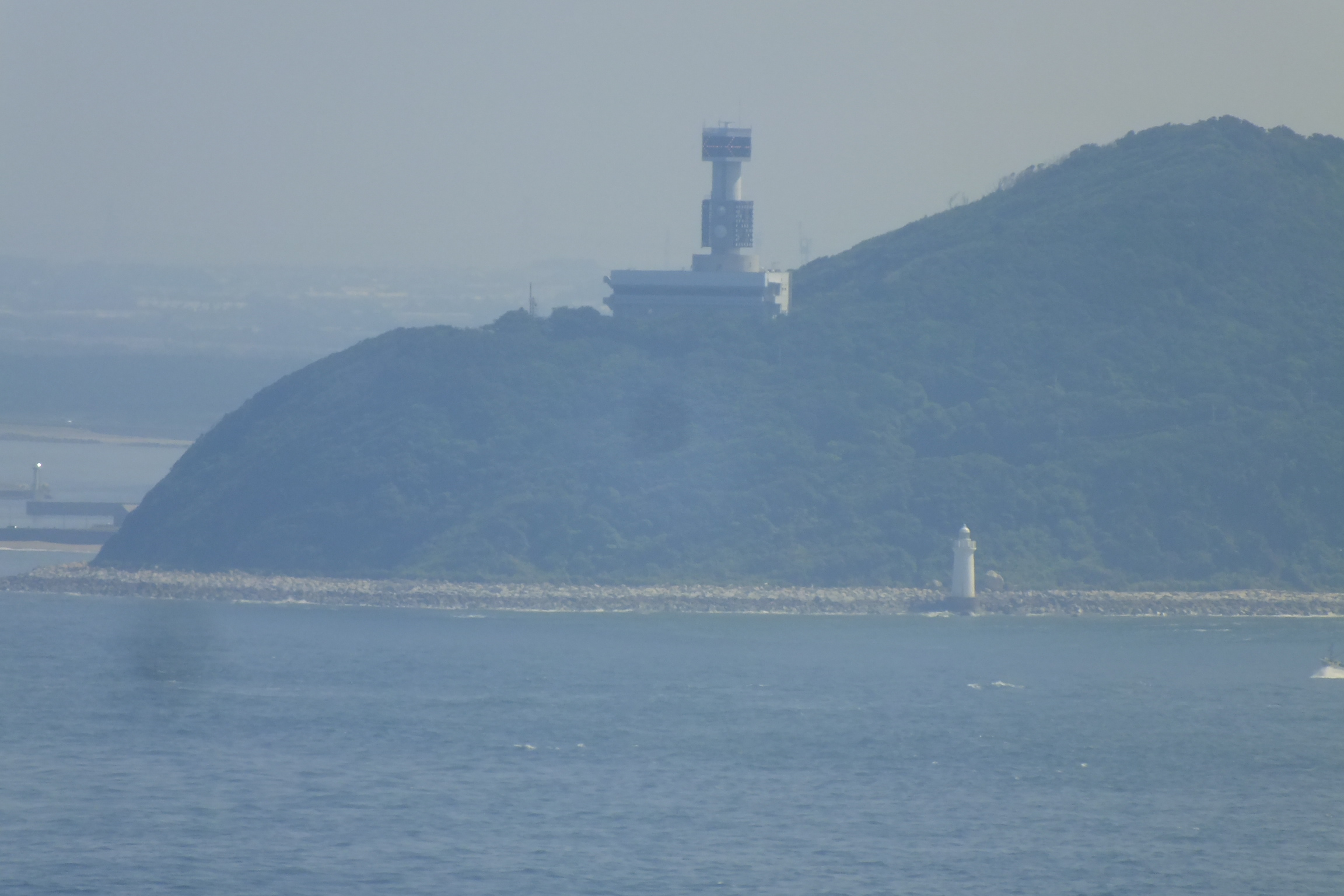 2016-08-05 Irago-misaki from Kami Island (Mie)灯台への道